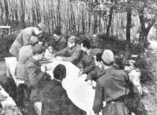 Seja lO OF Slovenije leta 1944 v Dohliču (Bela Krajina).